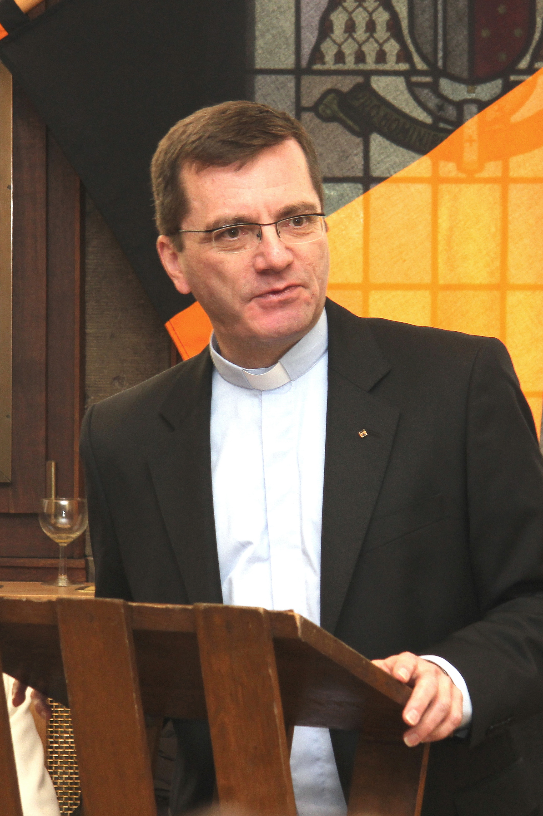 Ottmar Dillenburg, Generalpräses des Kolpingwerks, bei einem Vortrag in Koblenz